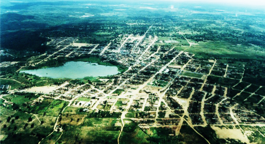 Vista Aérea